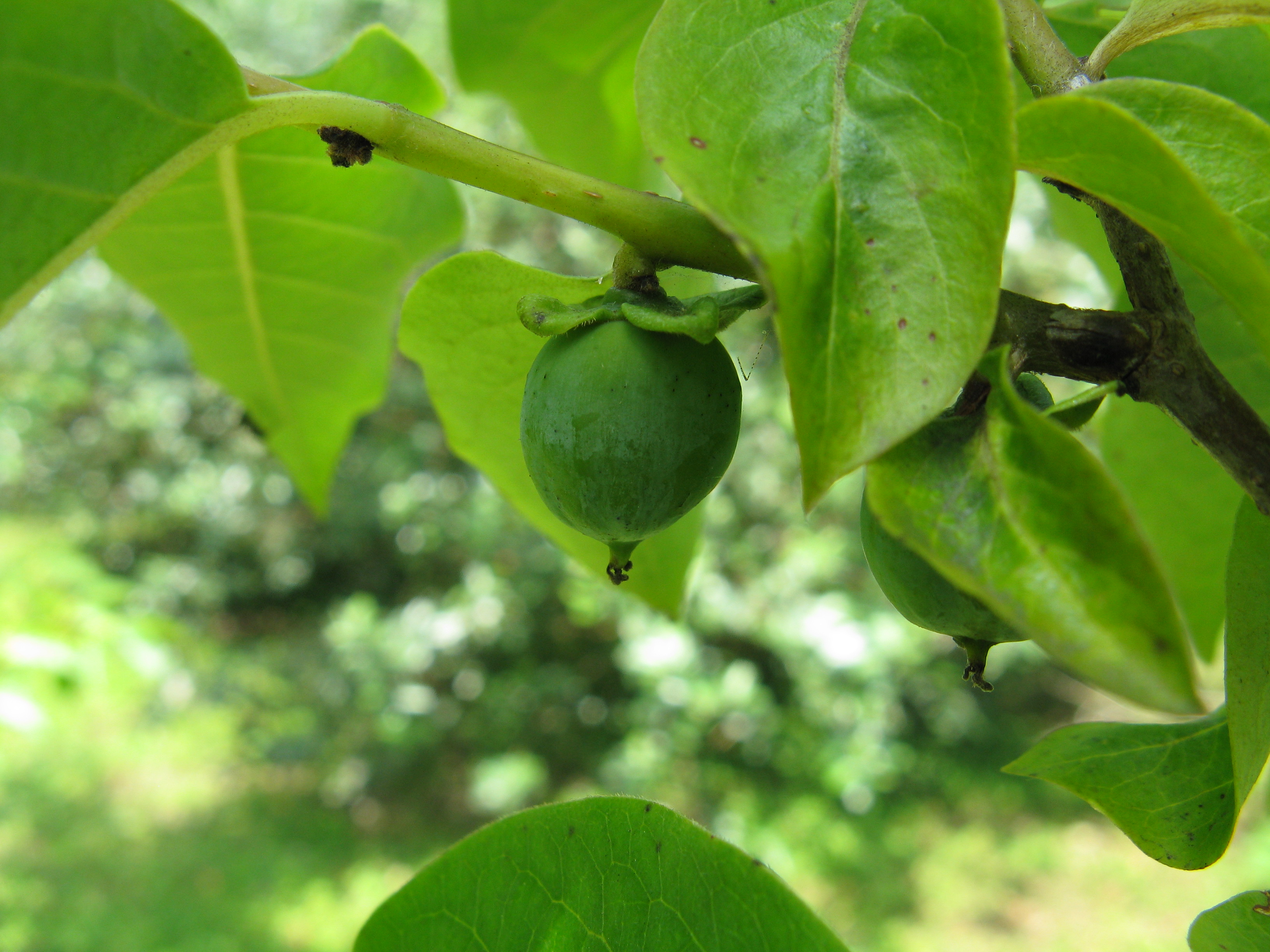 Scientific name Diospyros lotus